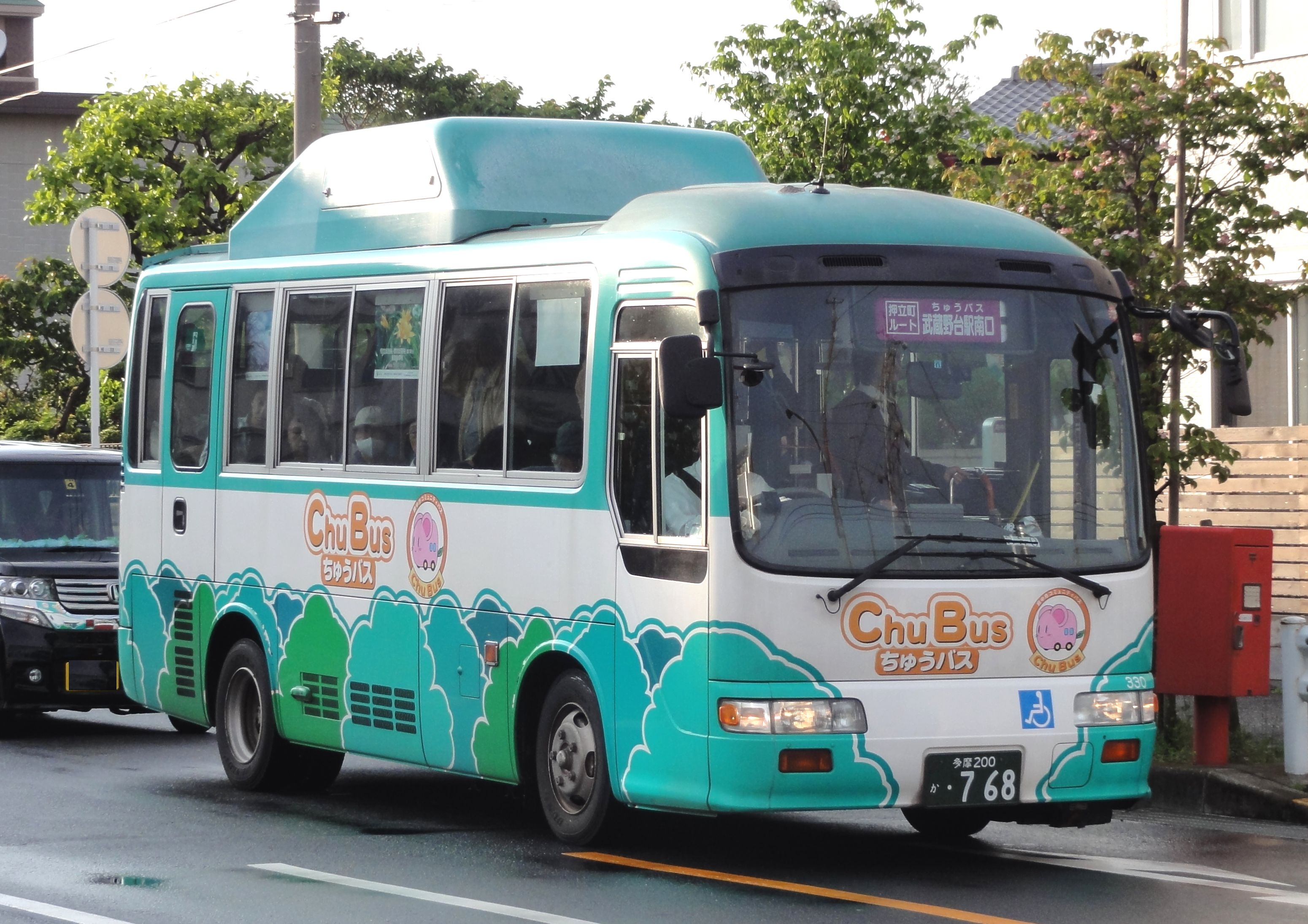 ちゅうバス（東京都府中市のコミュニティバス）